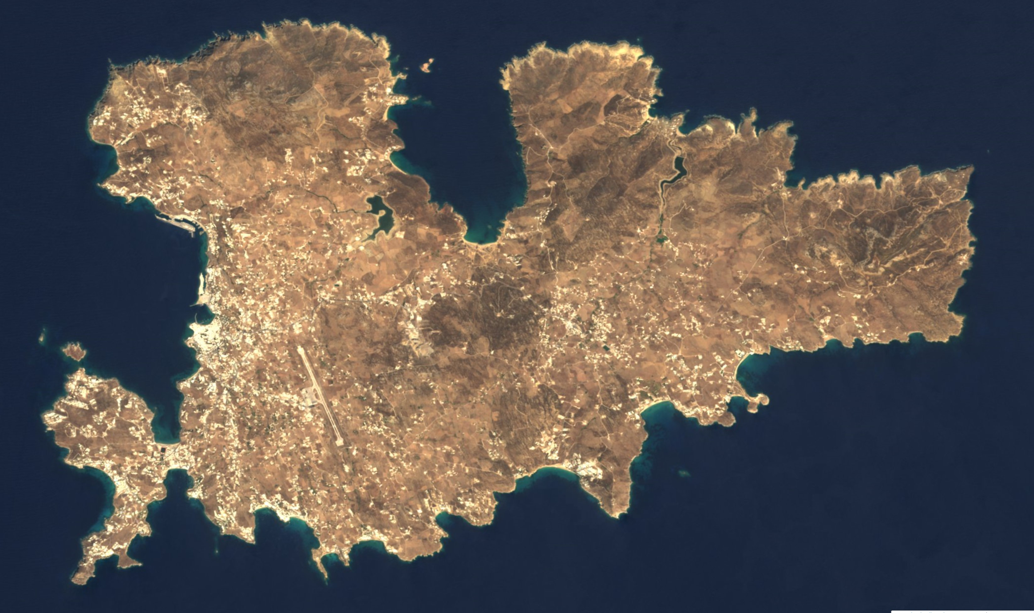 Mykonos (Satellitenbild)